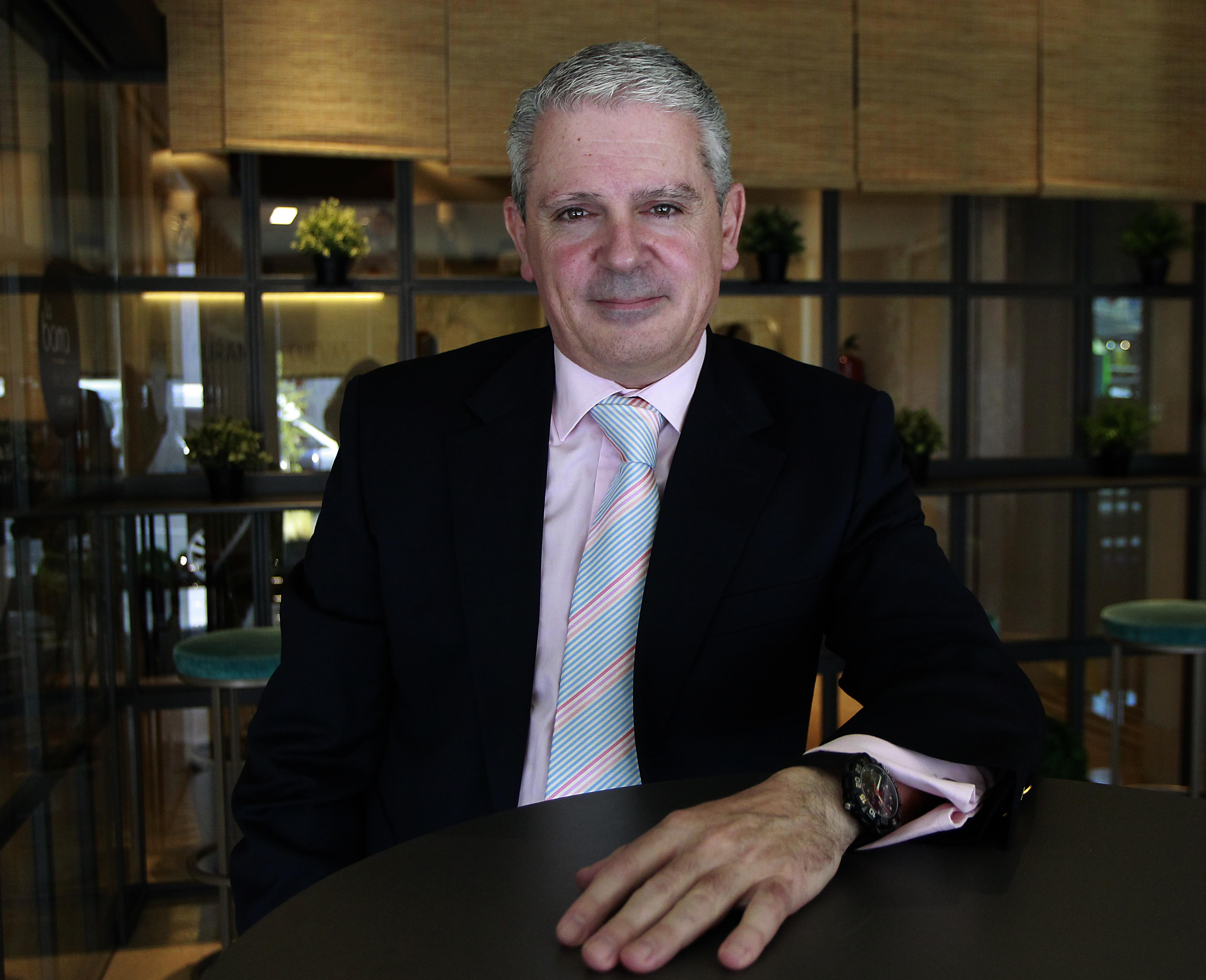 Pablo Crespo: "Toda la estructura del PP incluyendo el señor Rajoy conocía la forma de financiación". "Yo repartía los sobres en Galicia", dice Crespo